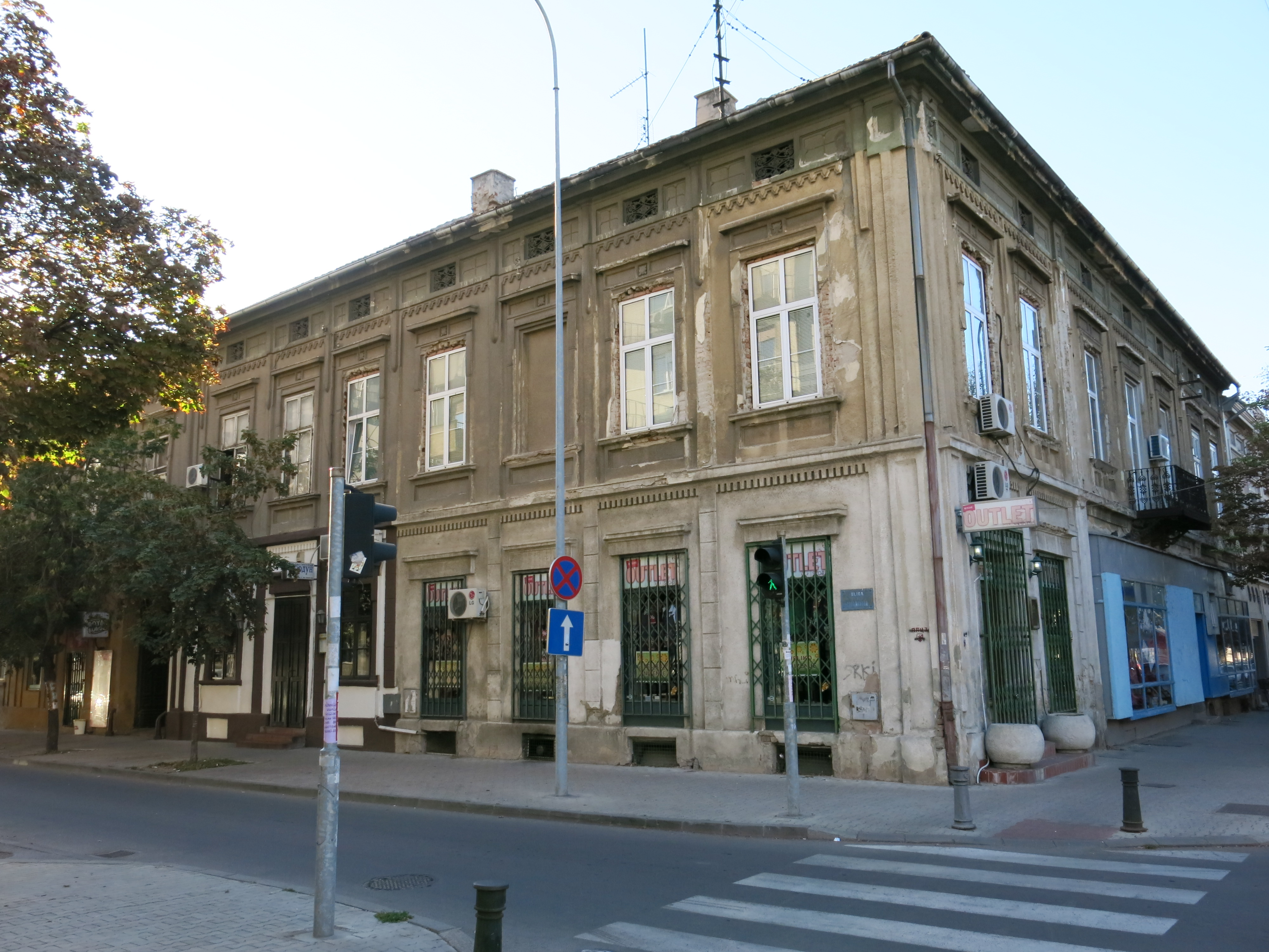 Кућа Дуде Бошковића